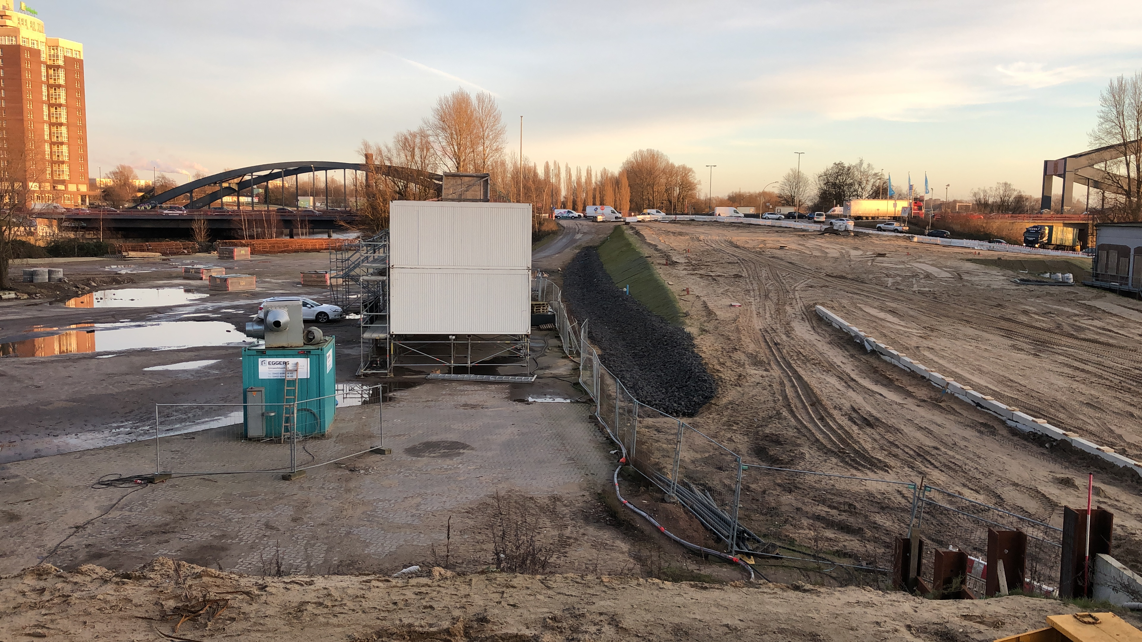 Baufläche des Elbtowers im Januar 2020